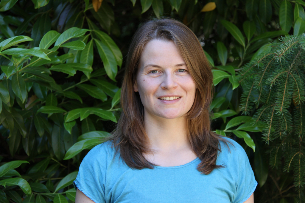 Sabine Niels (MdL), Fraktion BÜNDNIS 90/DIE GRÜNEN im Brandenburger Landtag